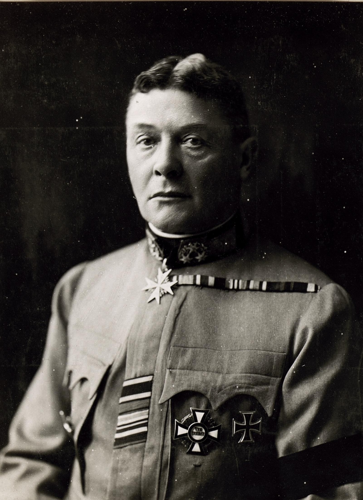 F.M.v. Kövess